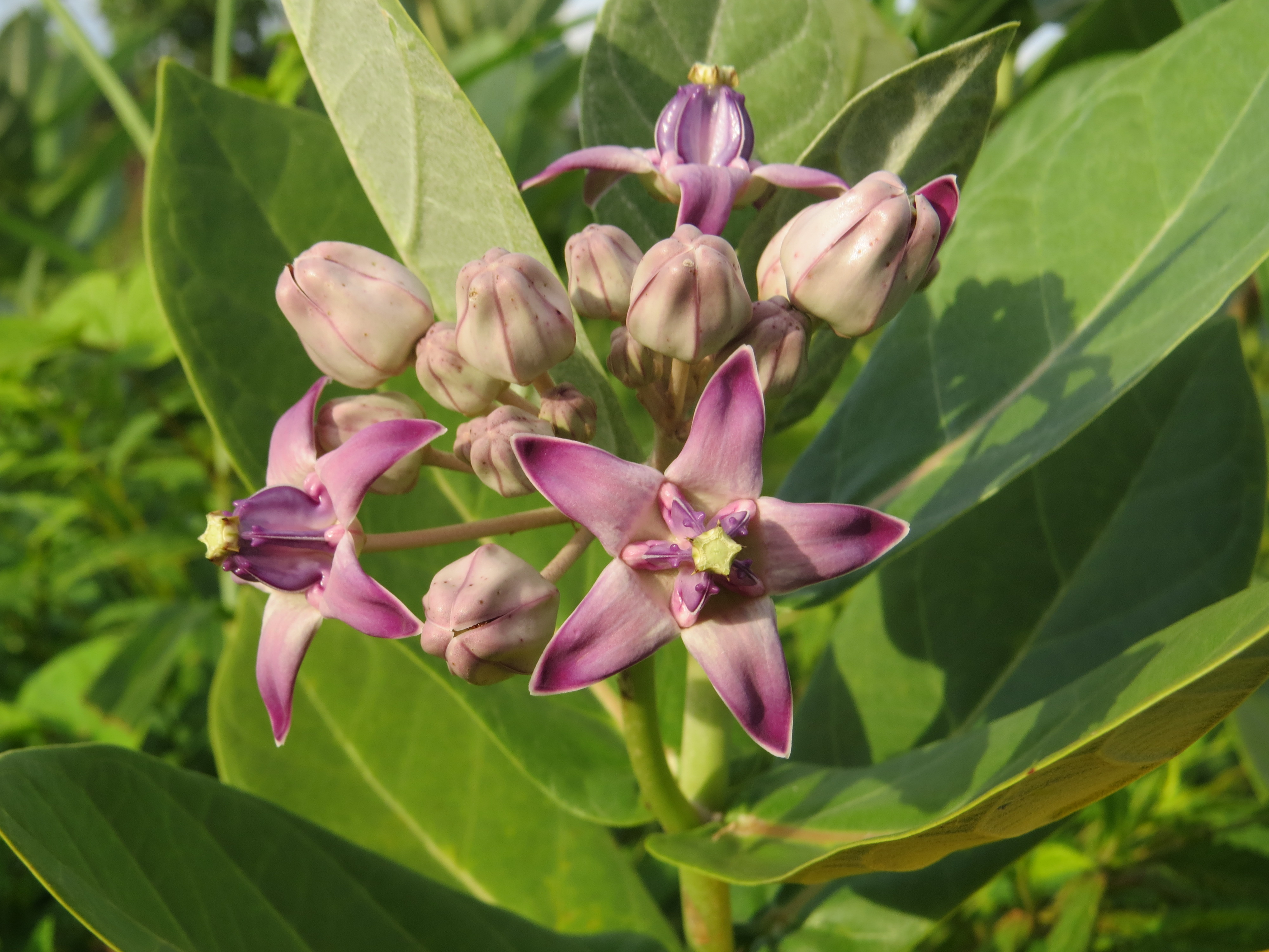 Photos by Vinayaraj